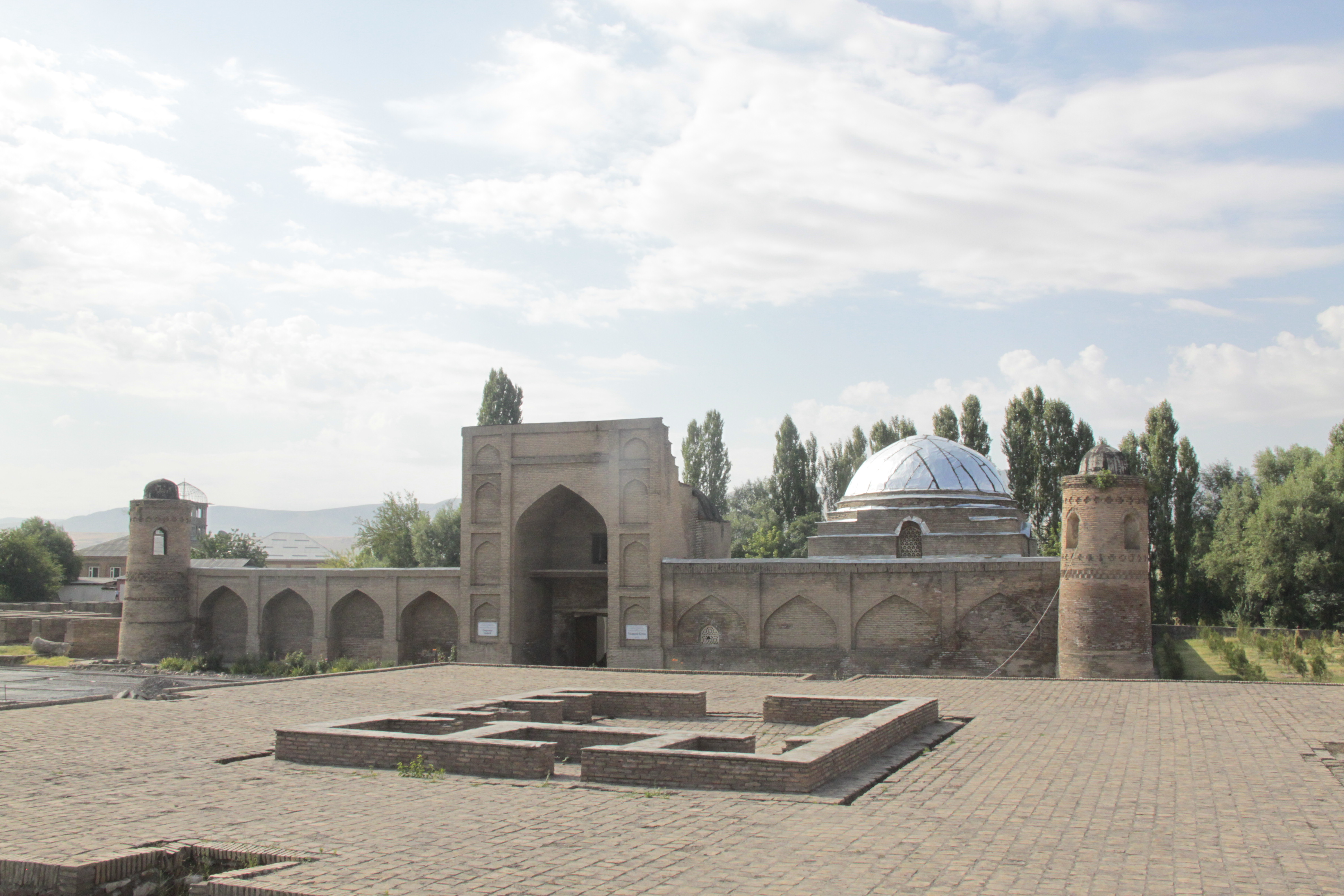 Тоҷикӣ: Мадрасаи нав. Қалъаи Ҳисор